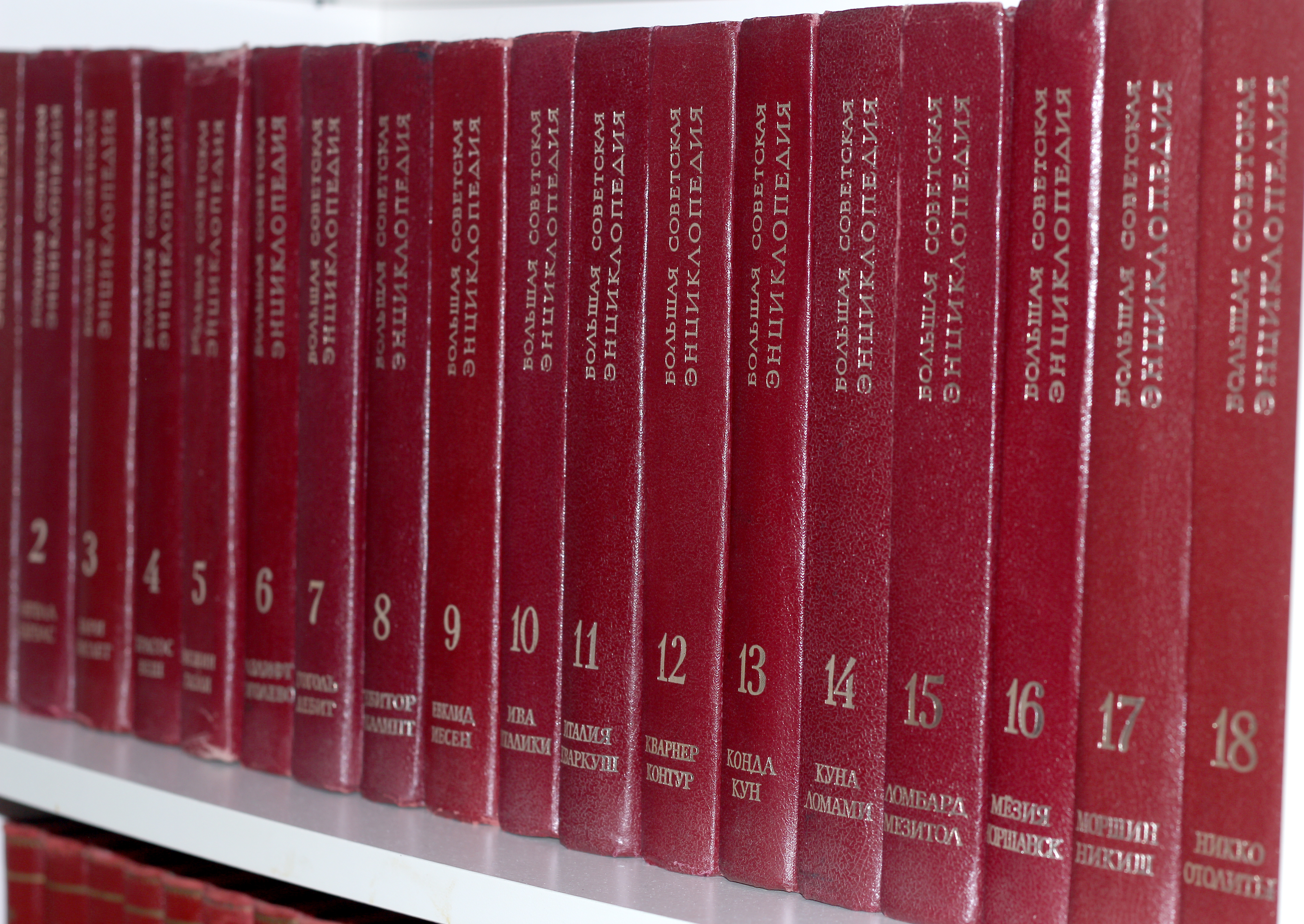 Большая советская энциклопедия - третье издание.